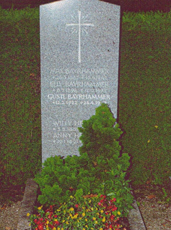 Friedhof Krailling-Gustl Bayrhammer